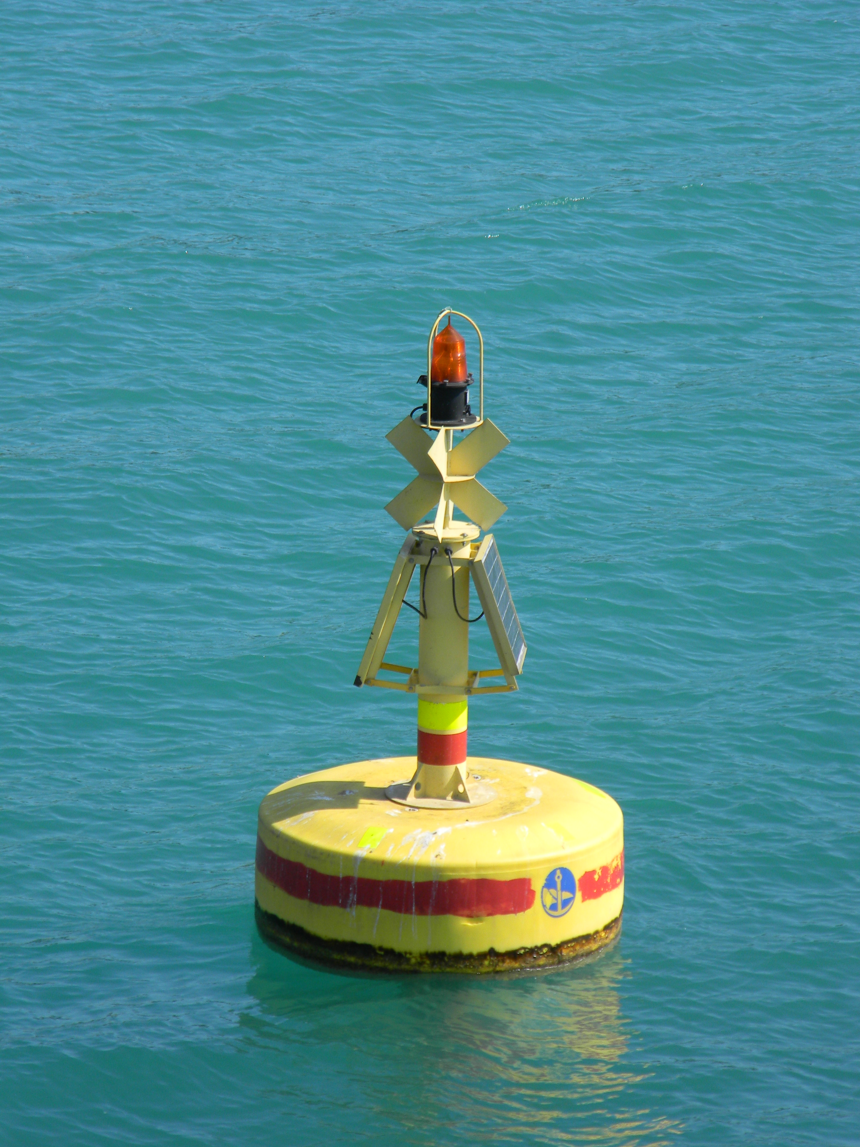 Bouée de signalisation sur le Lac de Garde en italie.